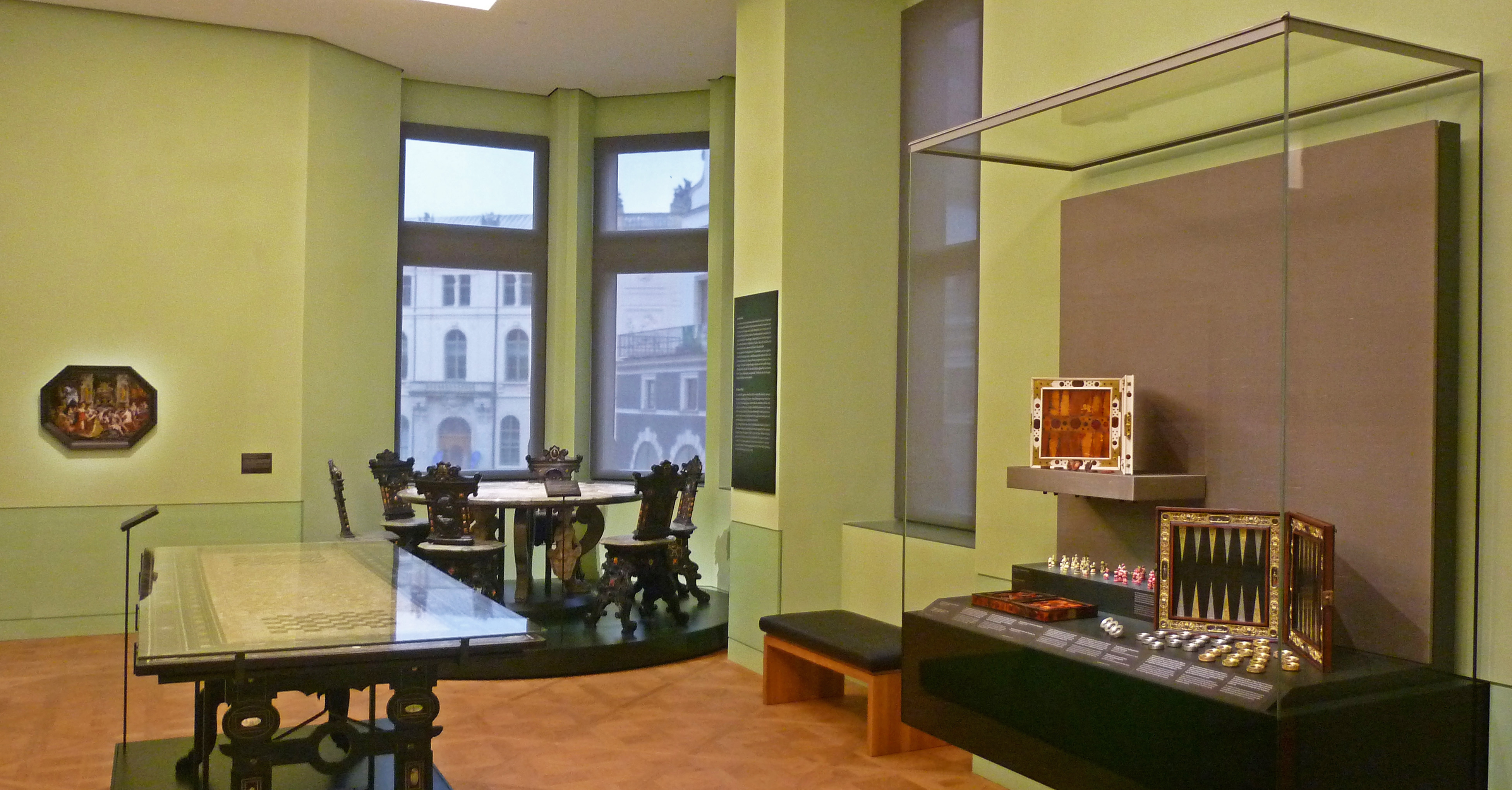 "Weltsicht und Wissen um 1600" ist eine Dauerausstellung der SKD im Residenzschloss in Dresden: Blick in den Raum 3 - Spielwelten.